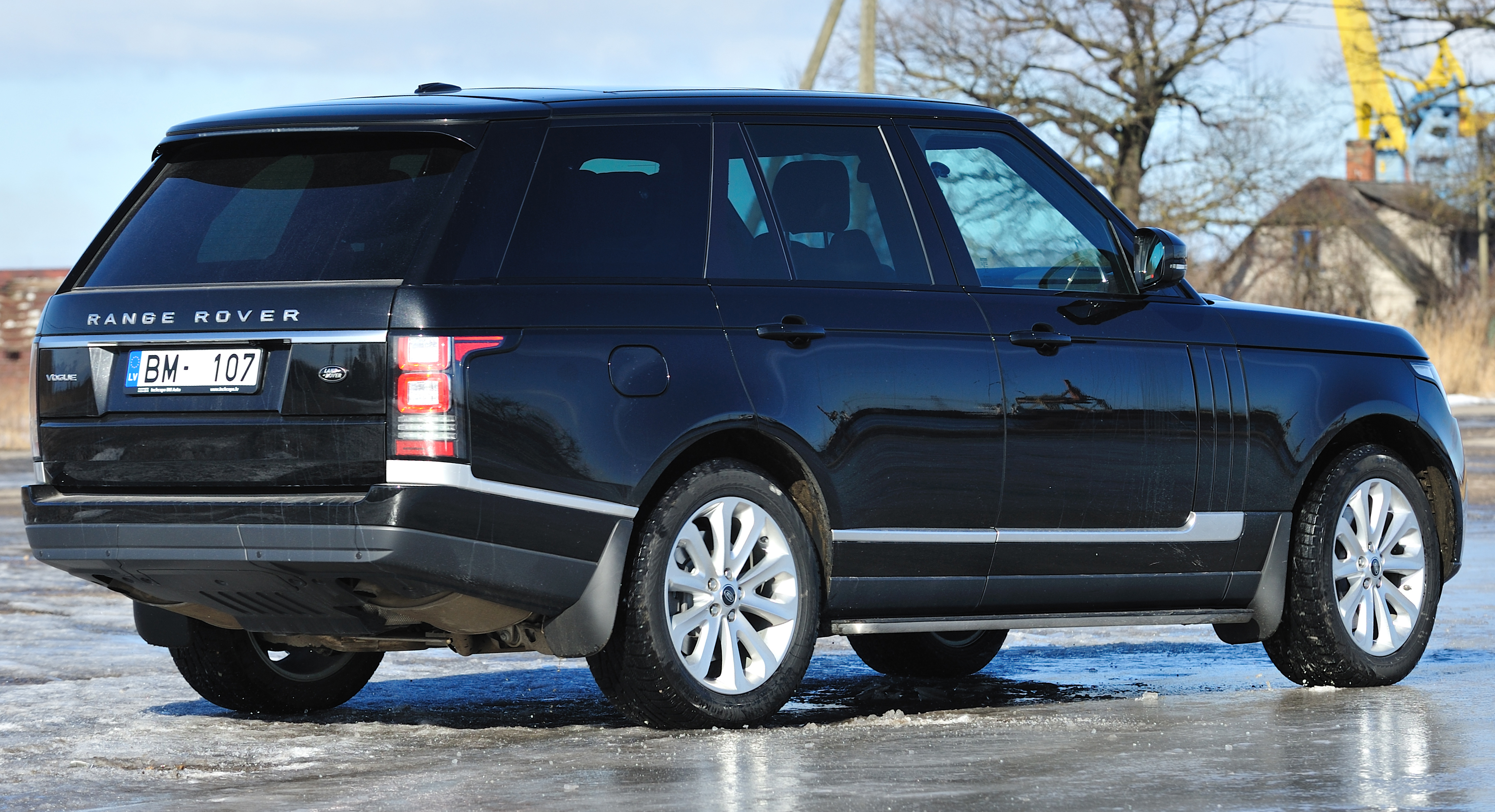 Attribution: Kaspars Garda, garda.lv